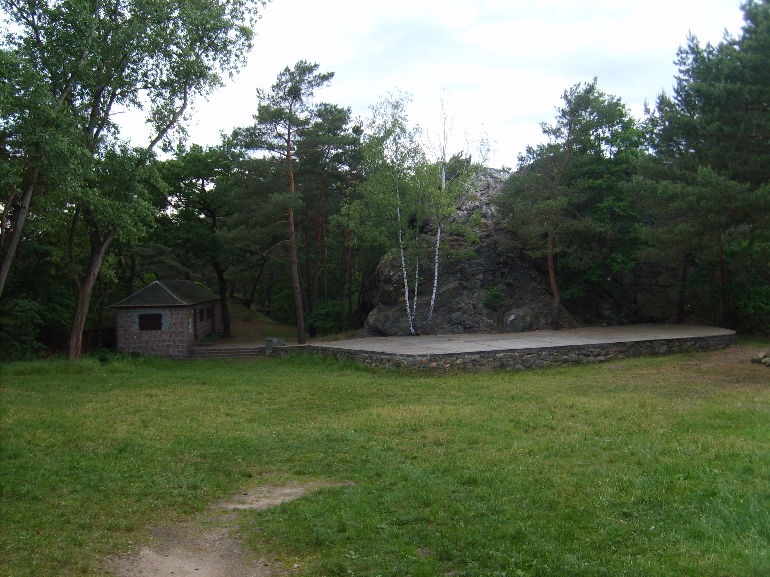 Rothsteiner Felsen